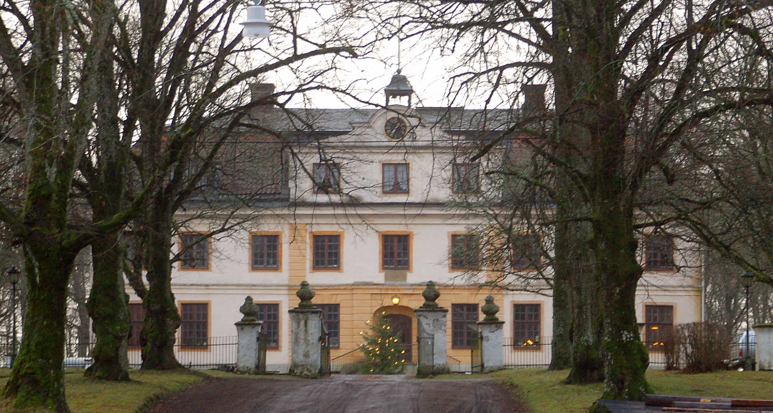 Värmland Säby herrgård